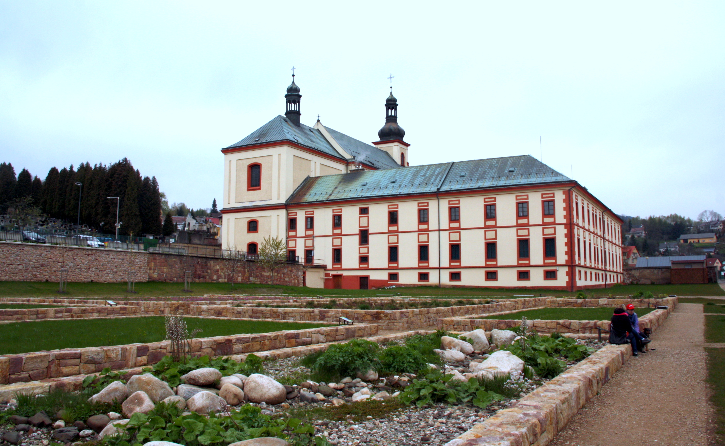 Klášter augustiniánů, Husova 213, Vrchlabí.